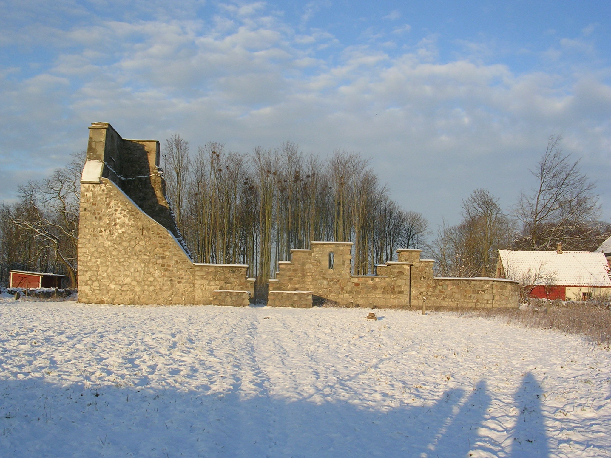 Västerstads kyrkoruin Author: Väsk Date: 2005-11-27